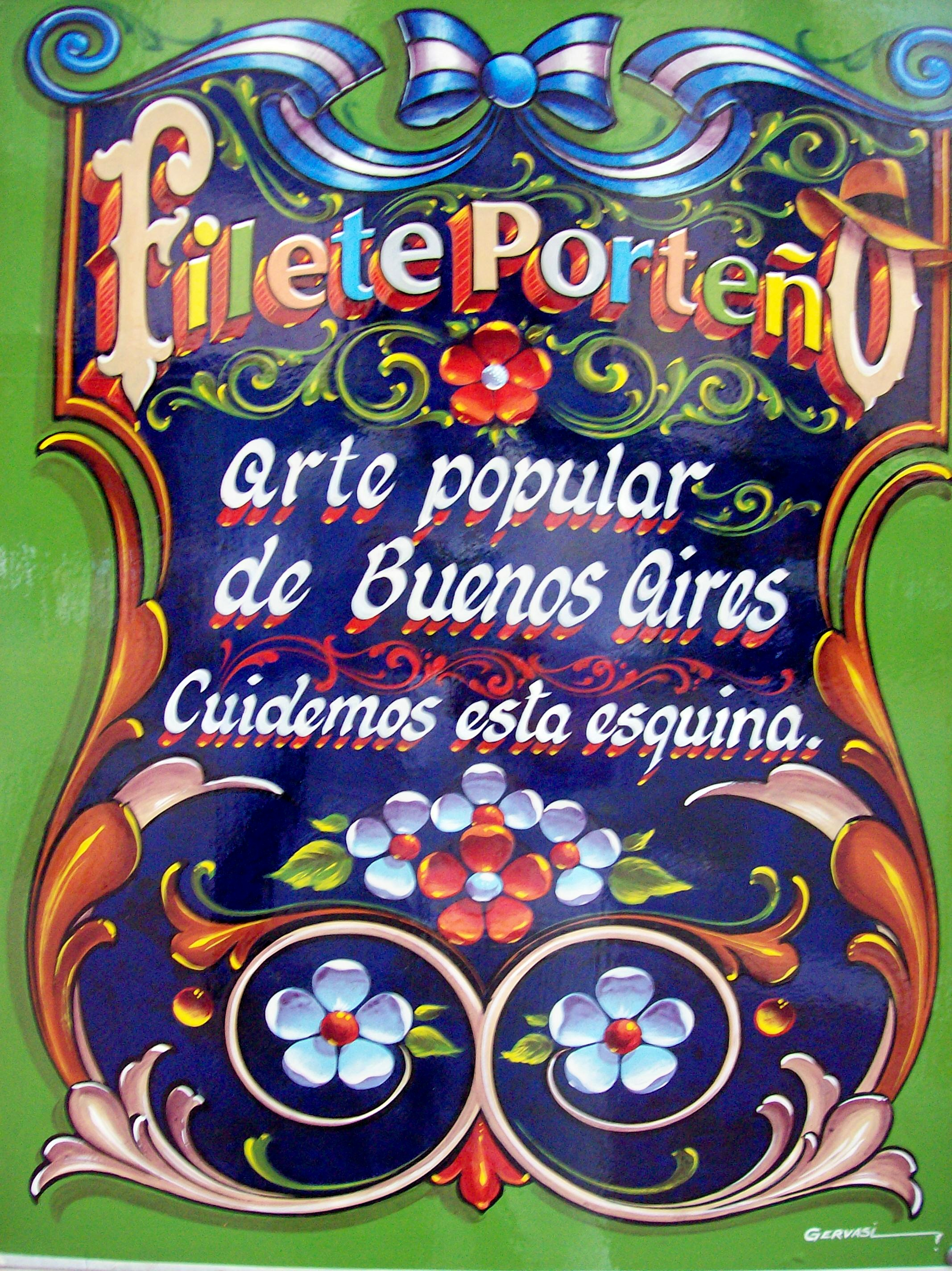 FILETEADO PORTEÑO: Buenos Aires, calles Carlos Gardel y Anchorena. Filete de Elvio Gervasi.